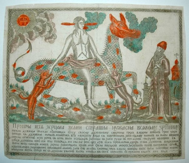 Дева на огненном змее. (Притча из зерцала вельми страшна и ужасна всякому христианину)